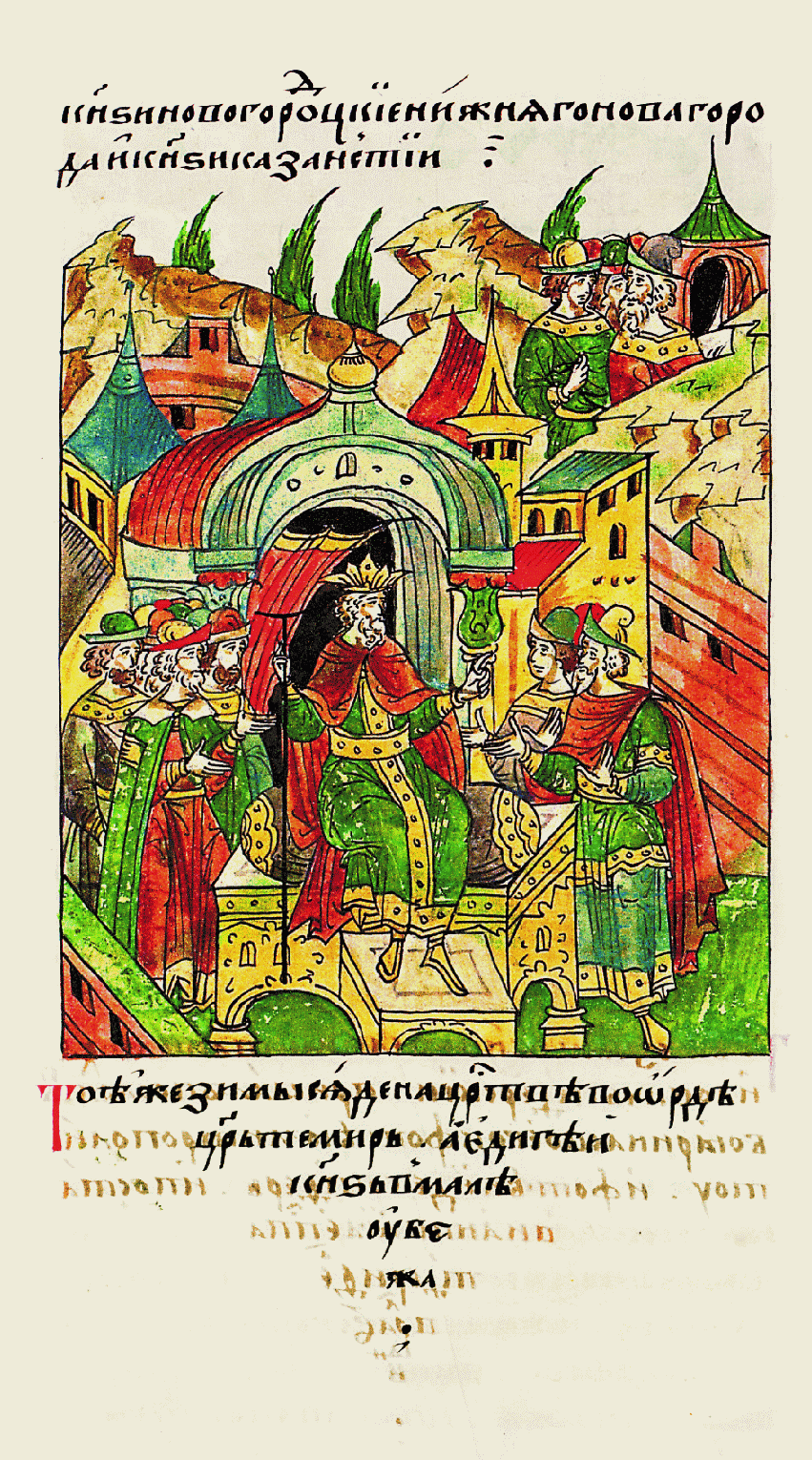 В ту же зиму стал править в Орде царь Темир, а князь Едыгей бежал.